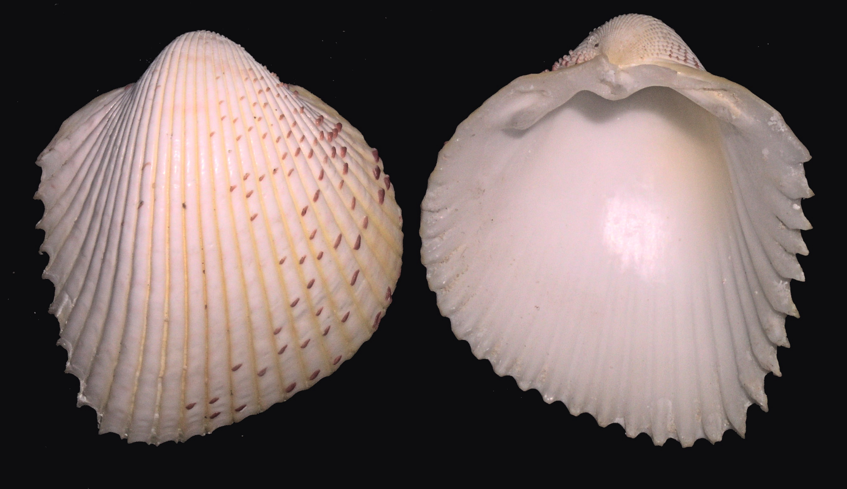 Fragum unedo